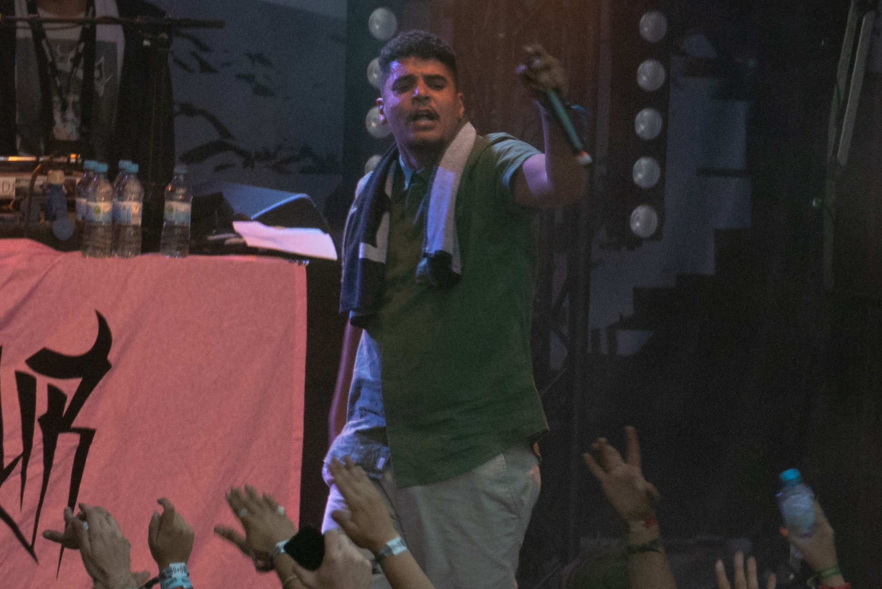 Nate57 beim Splash!-Festival 2018